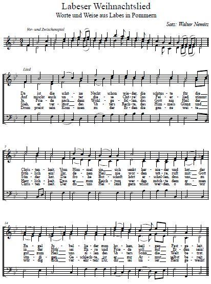 Walter Nemitz. Zapis utworu "Kolęda Łobeska"